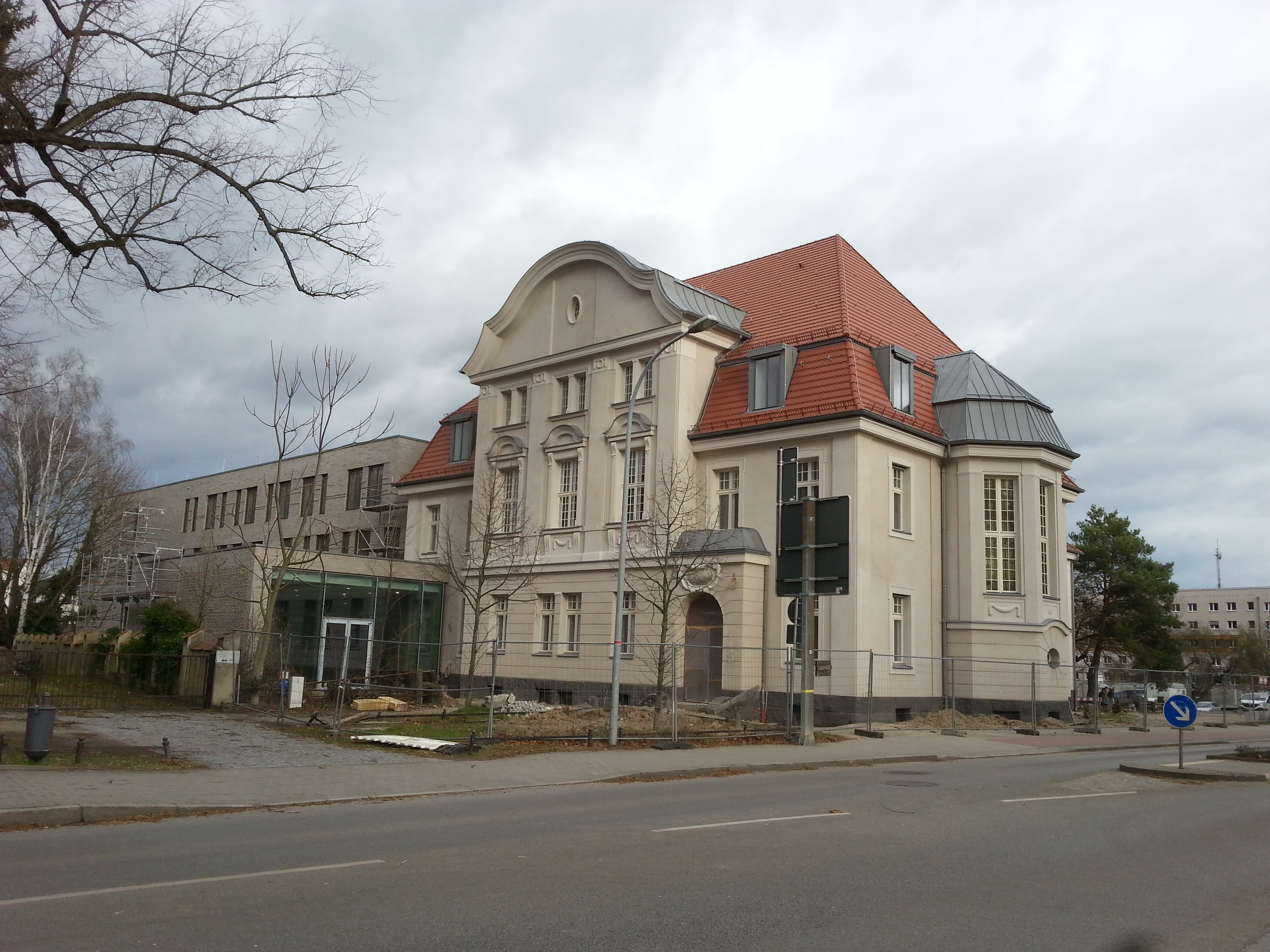 Das Amtsgericht in Königs Wusterhausen während der Sanierung 2020.